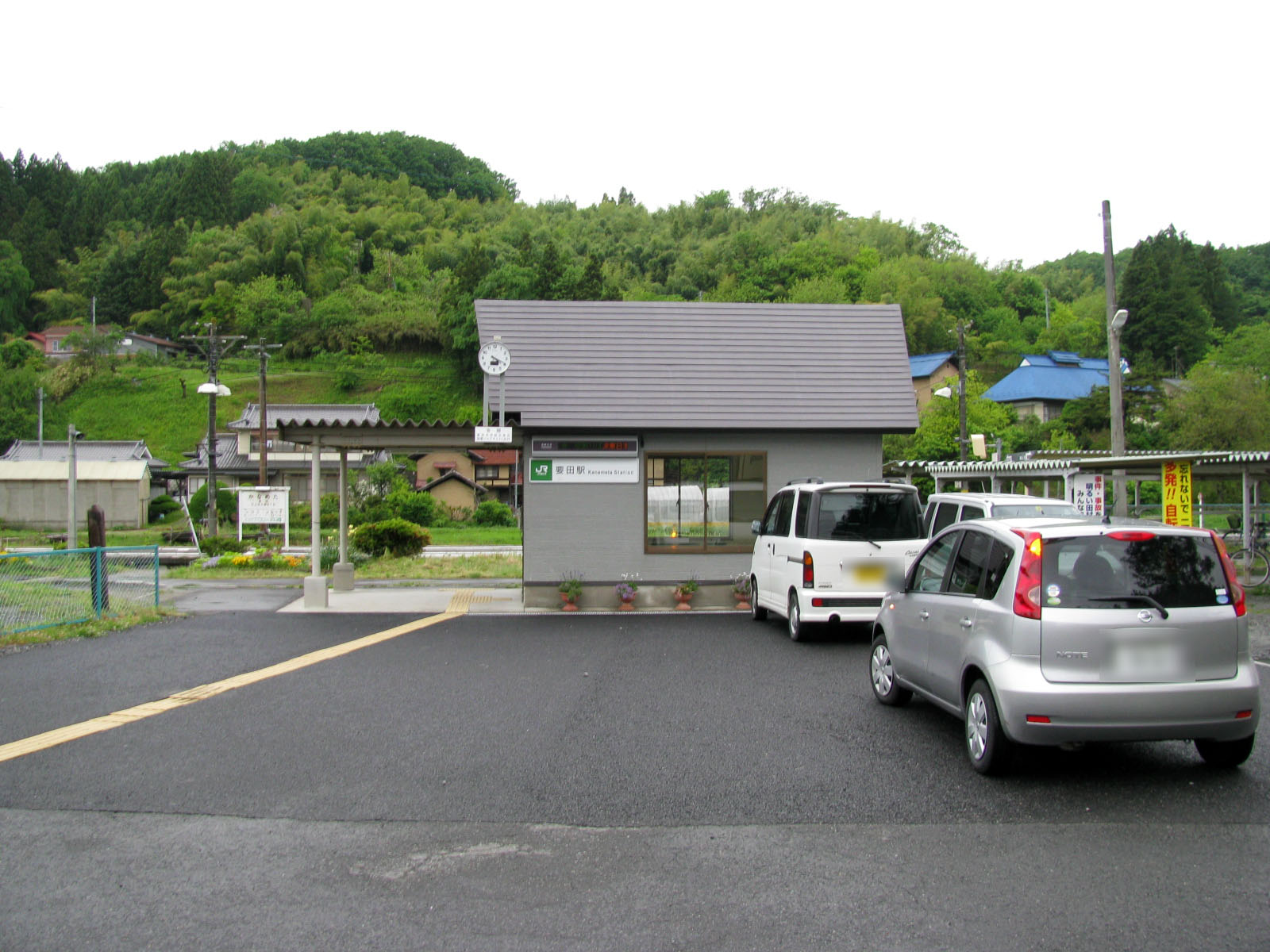 磐越東線要田駅